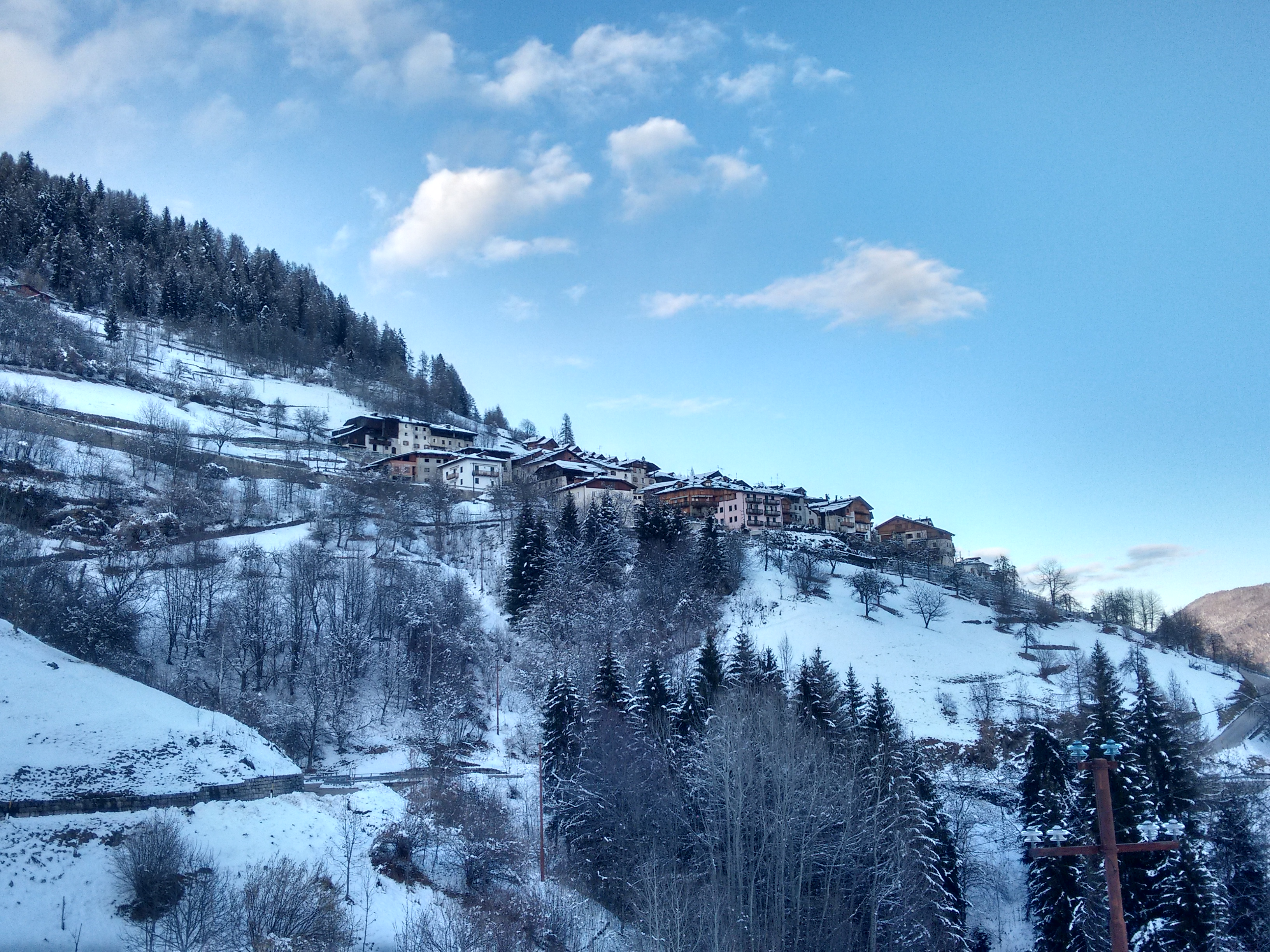 Bolentina